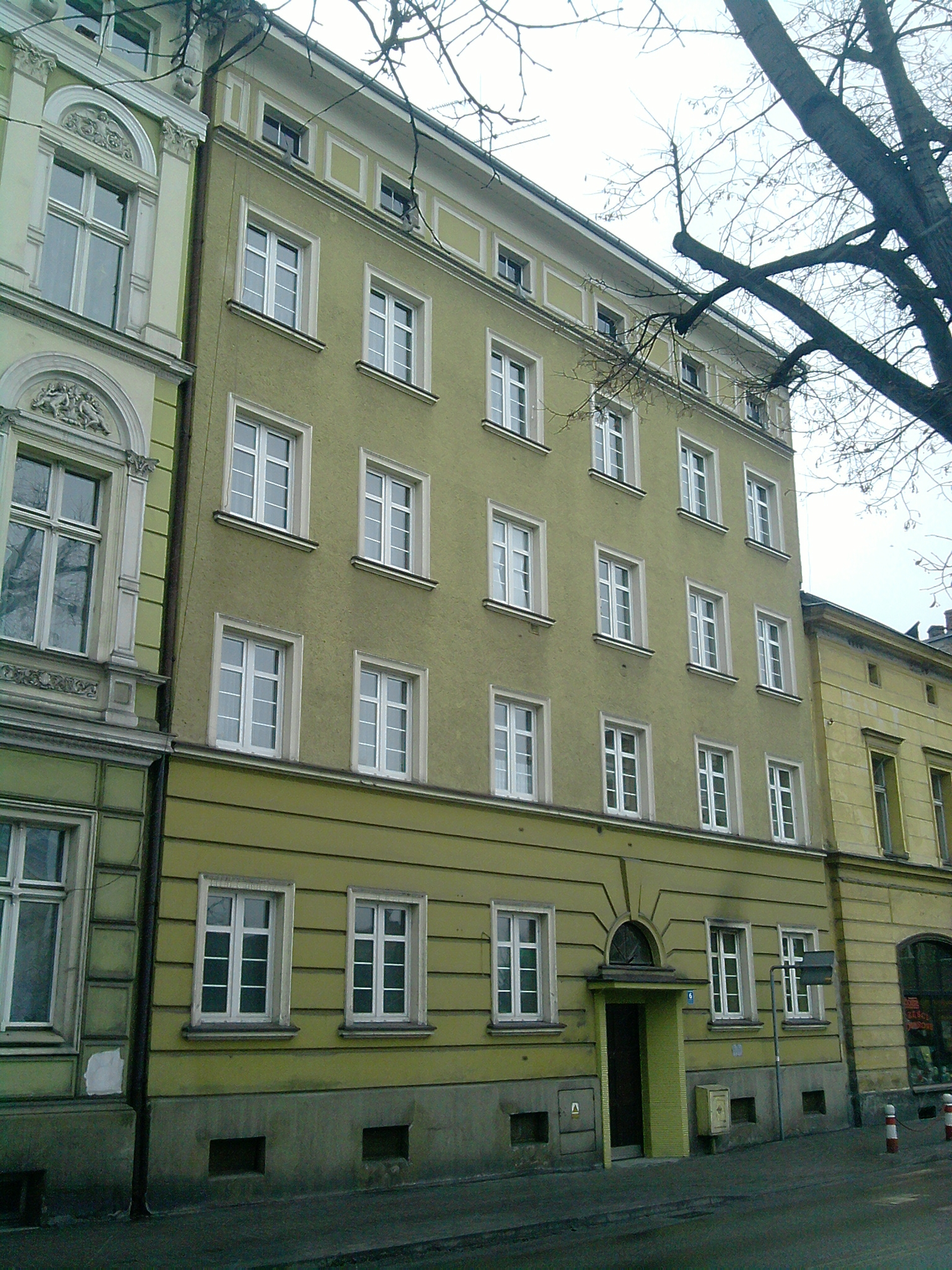 Kamienica przy placu Wolności 6